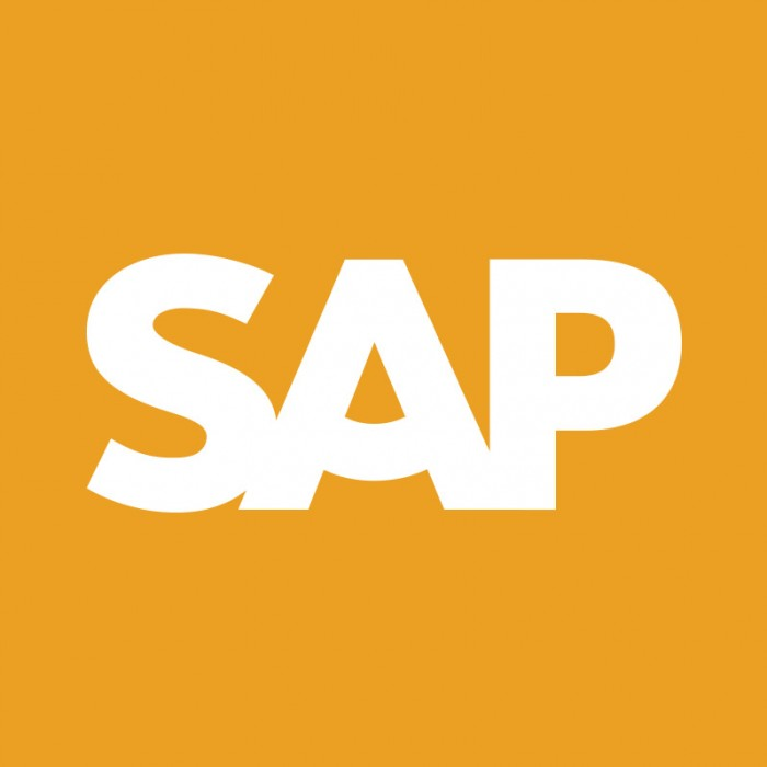 Logo der Firma SAP im Jahr 2014